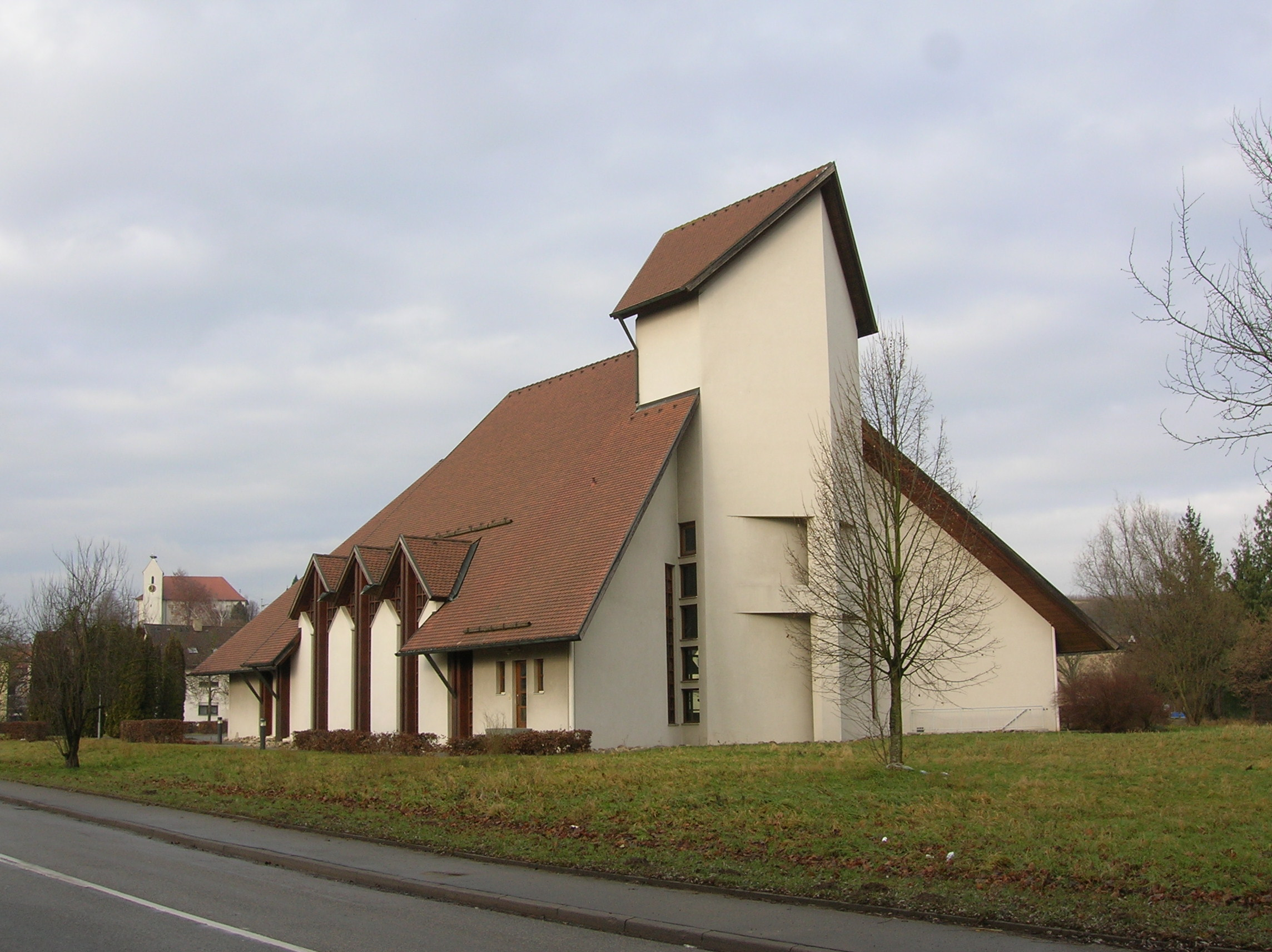 Obfige, Fryybeg, Khadoolischi Chilche